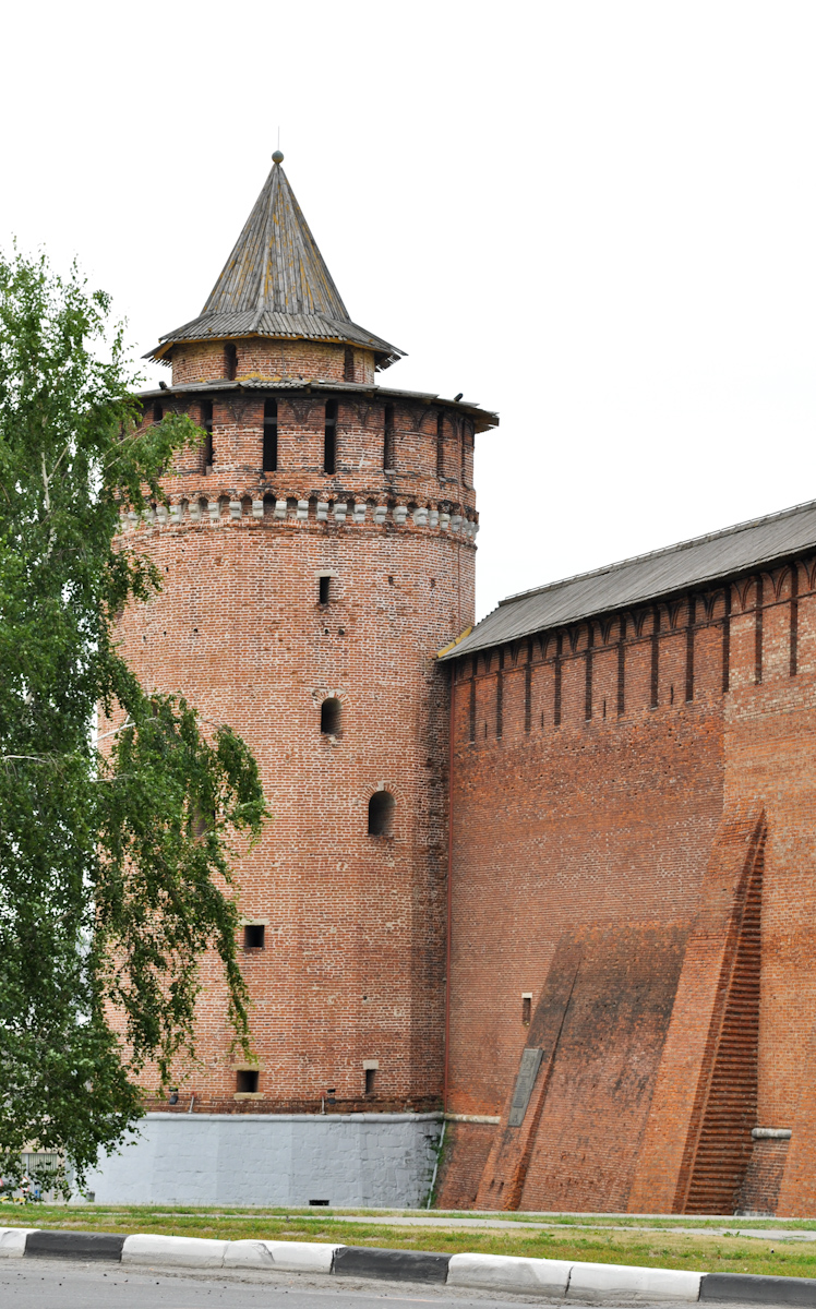 Башня Коломенская (Маринкина) (Москва и Московская область, Коломна, улица Лазарева, угол улица Октябрьской Революции)